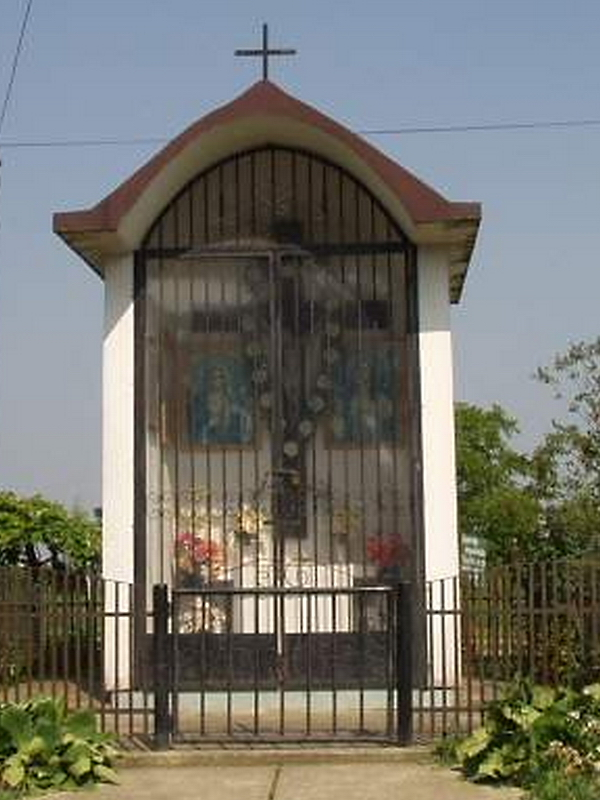 Marinkovac - Kapelica-Raspelo